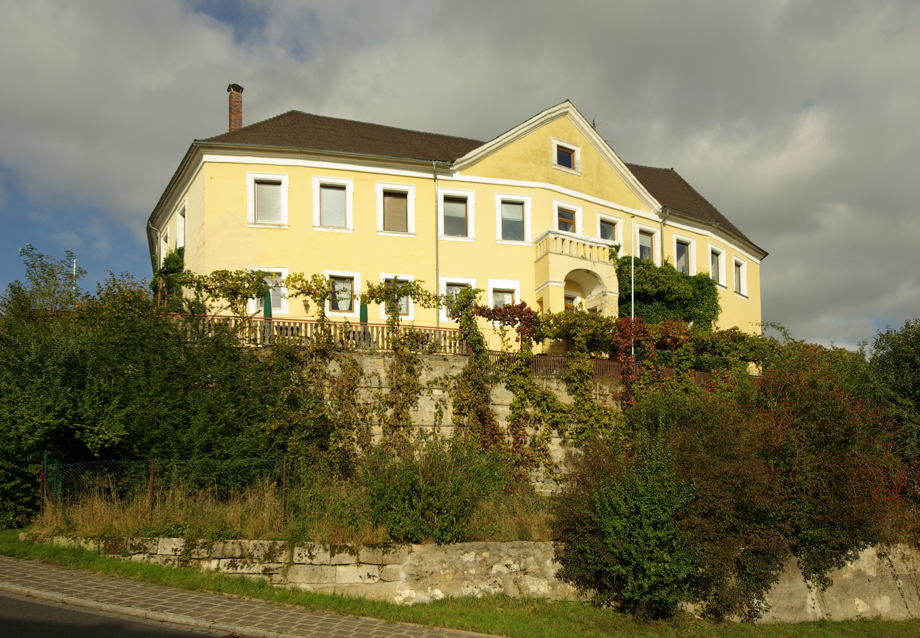 Schloss Marloffstein (ehem. Burg)